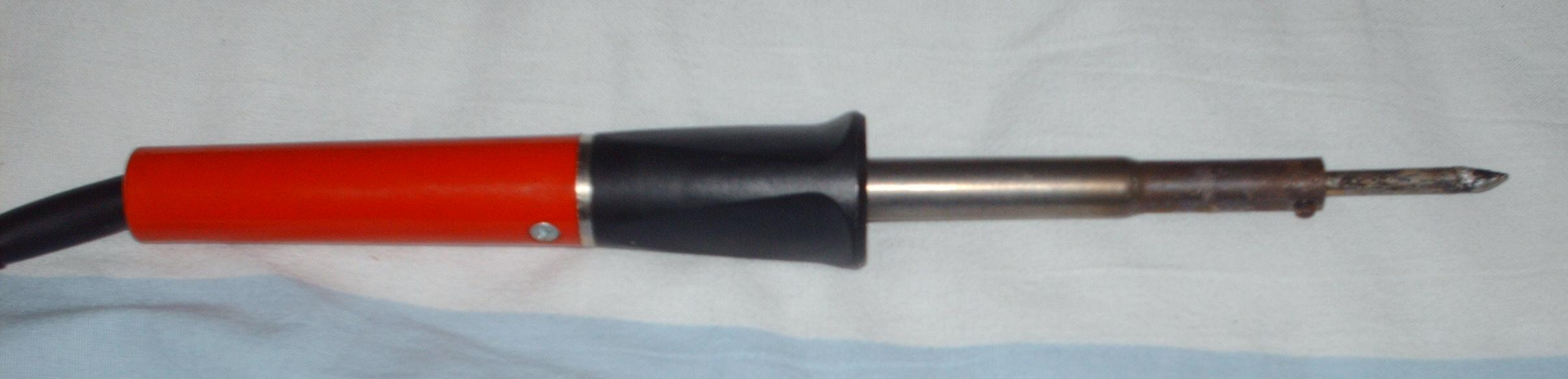 Dit is mijn broer zijn soldeerbout, een goedkope prul van ******* en 25 watt. Ik heb deze gefotografeerd op mijn bed. Zie de meta-data voor onuttige info. Je mag met deze afbeelding doen wat je wilt.